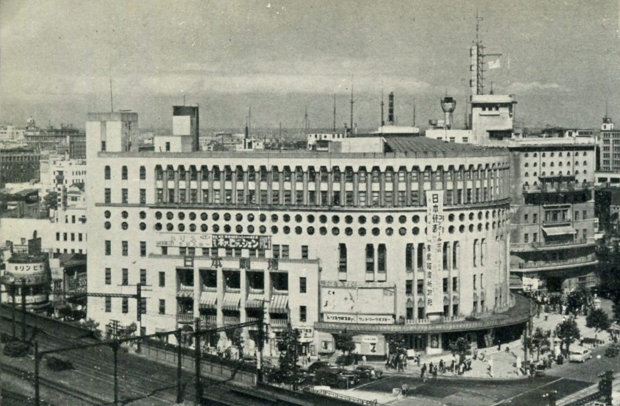 1952年の日劇。日劇ミュージックホールの看板が見えるので撮影年を特定出来る。